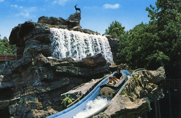 Edenlandia (Napoli) nel 1965